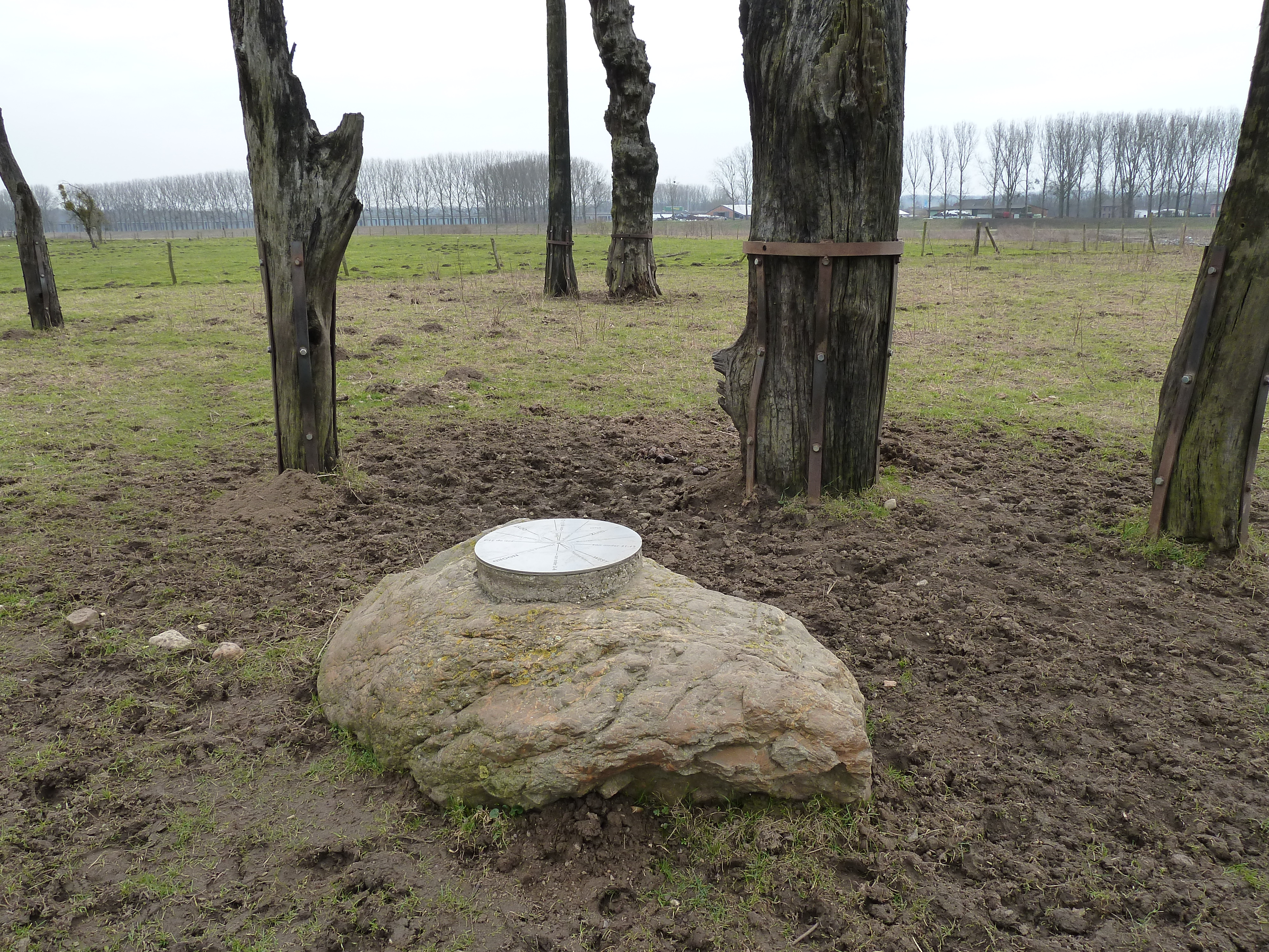 Bomencirkel van Meers (Woodhenge), Meers, Stein, Limburg, Nederland